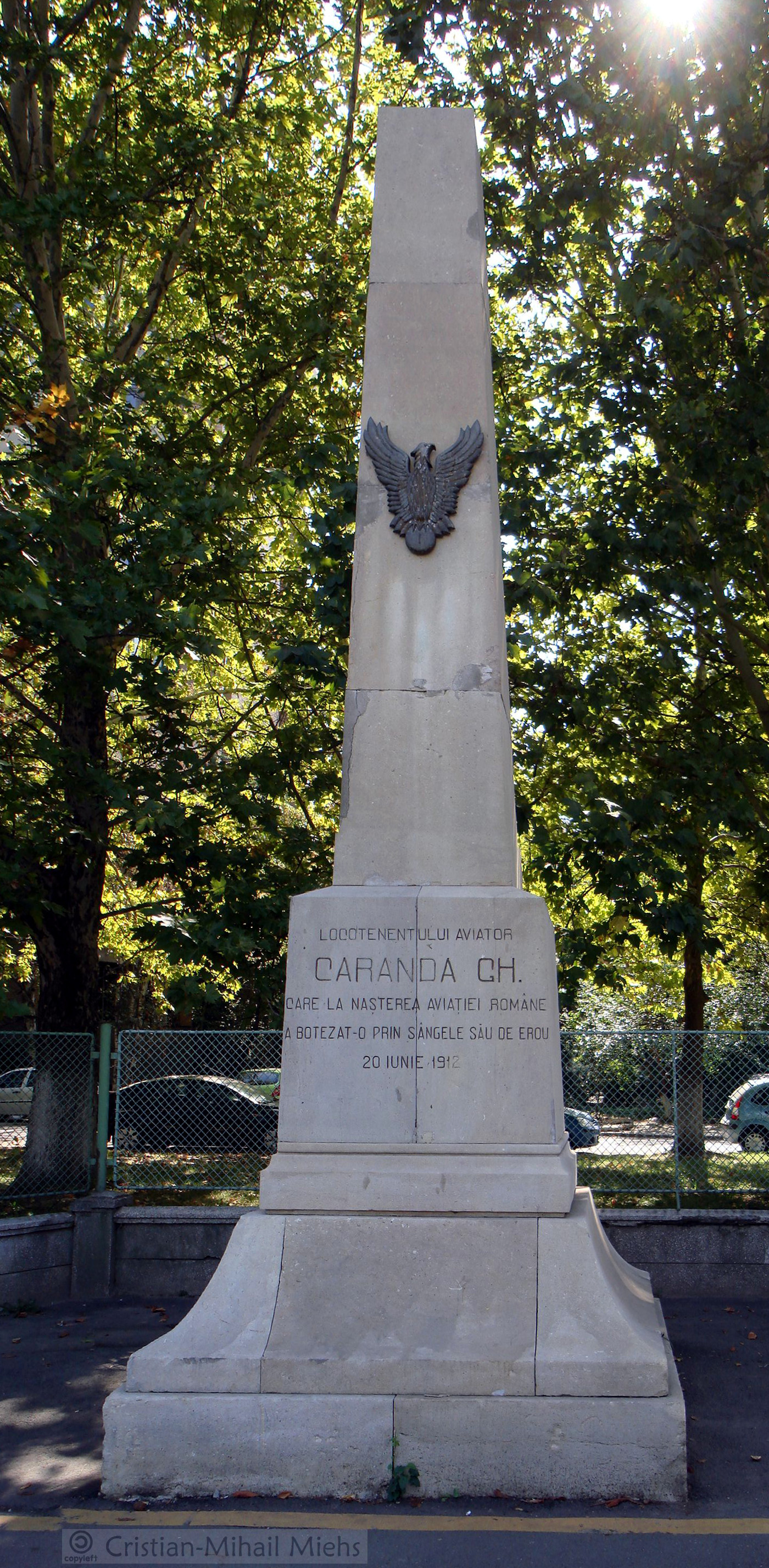 Obeliscul lui George Caranda, locotenent aviator, căzut la 20 iunie 1912